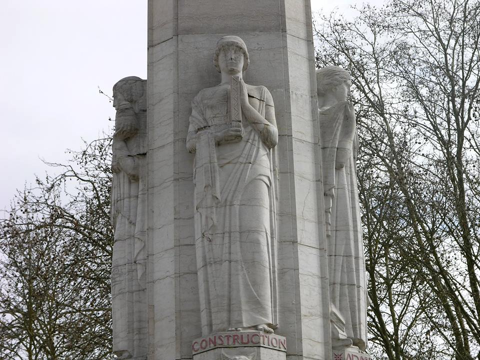 Construction, une des quatre allégories figurant sur le mémorial